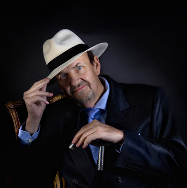 Aktuelles Foto von Matthias Kaiser